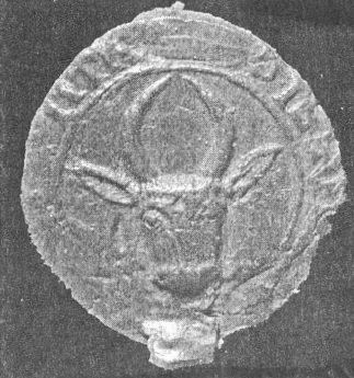 Hahót nembeli (II.) Arnold körpecsétje 1239-ből (ökörfej)